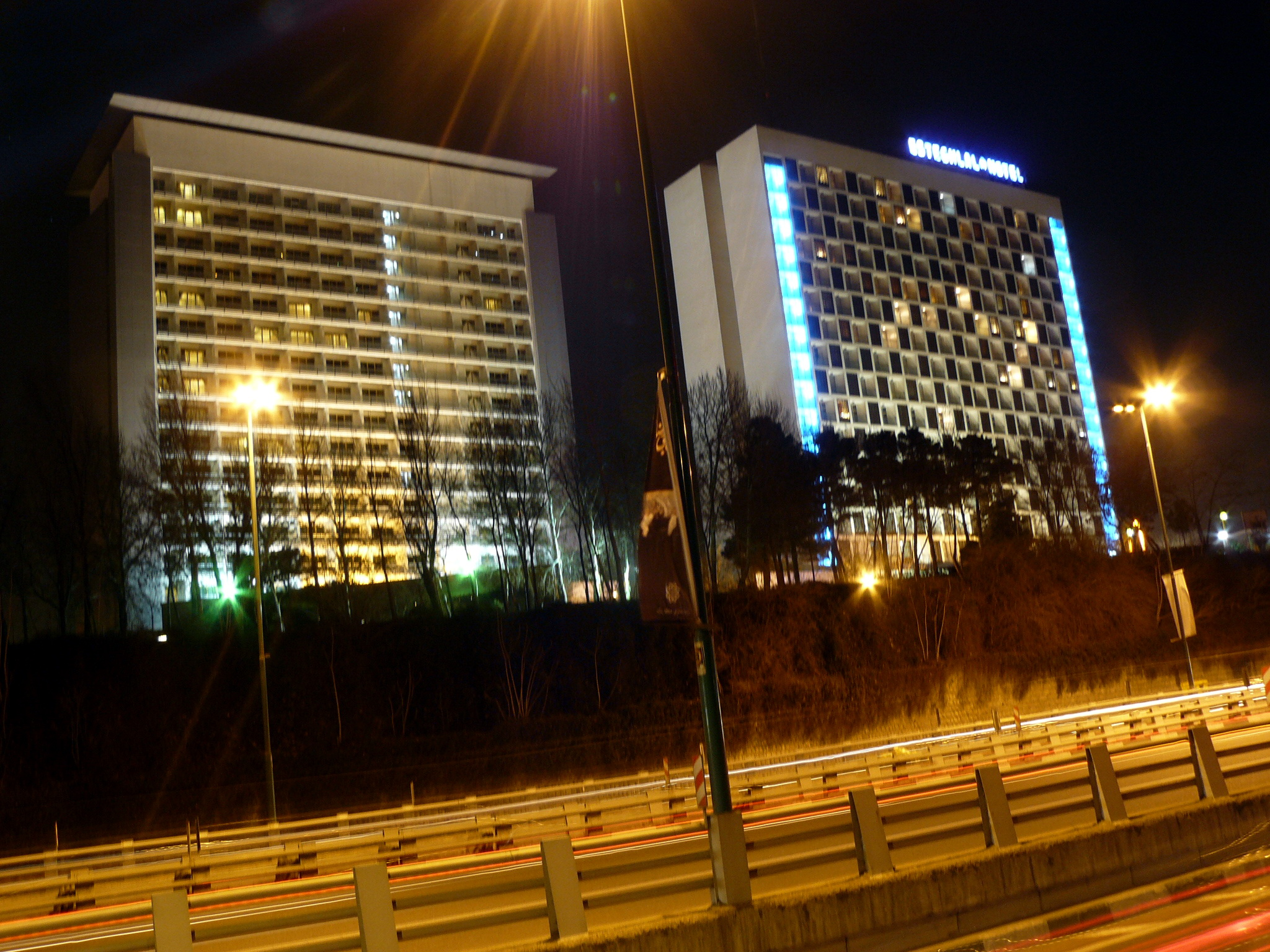 HOTEL HILTON 2009